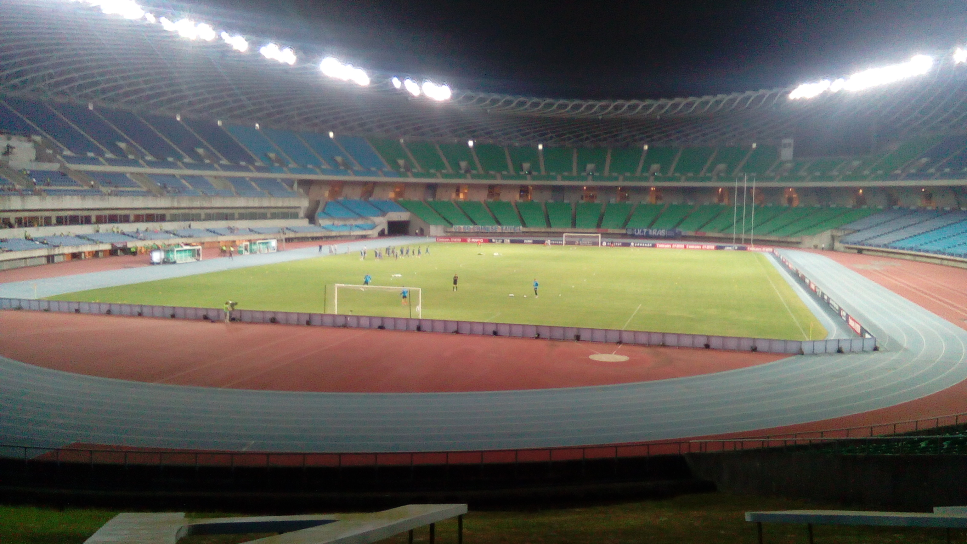 10月15日 中華對上澳洲前攝